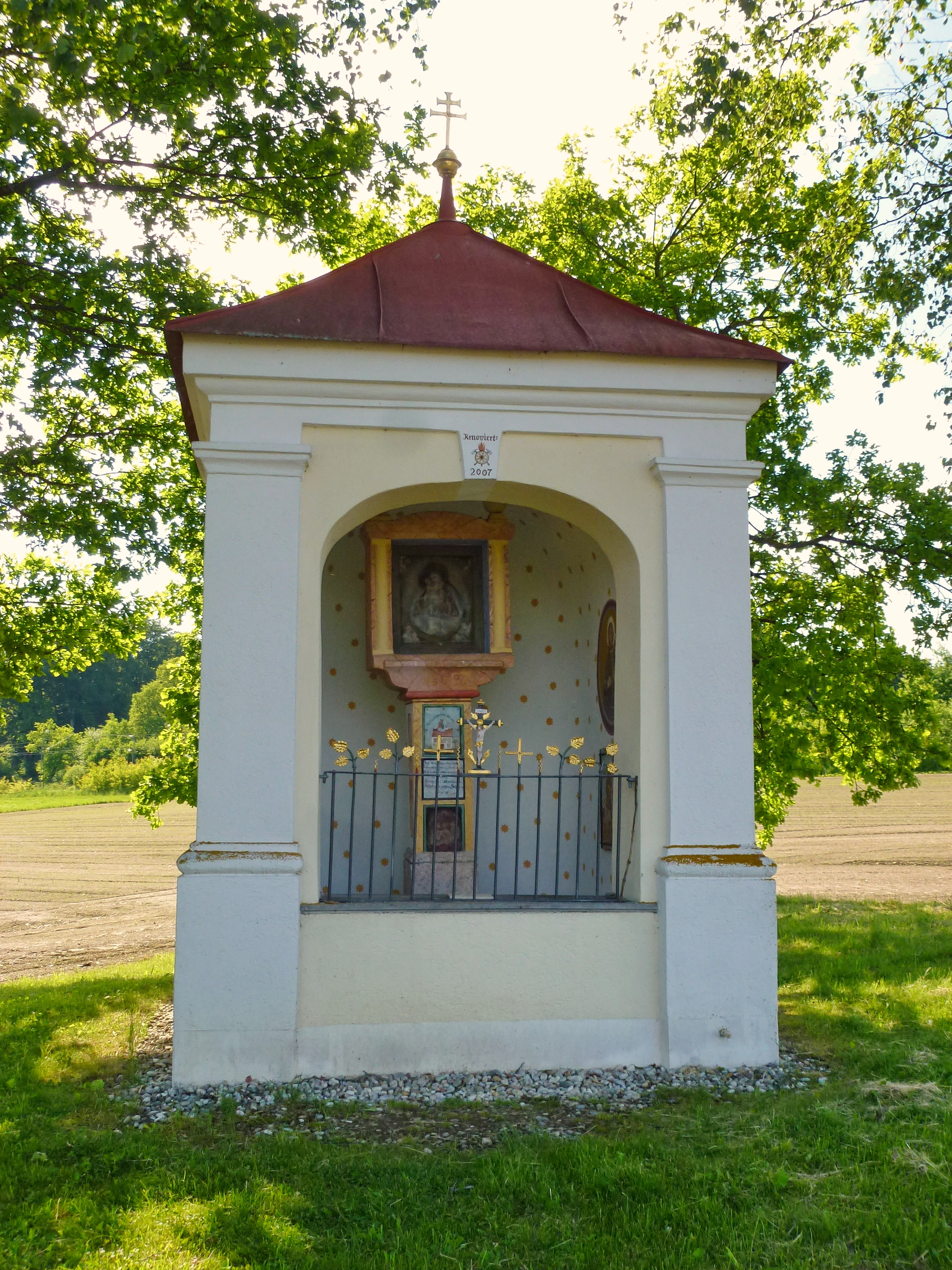 Kottgeisering, Feld-Kapelle St. Florian, nach dem Stifter auch Huttner-Kapelle genannt. Ansicht von O